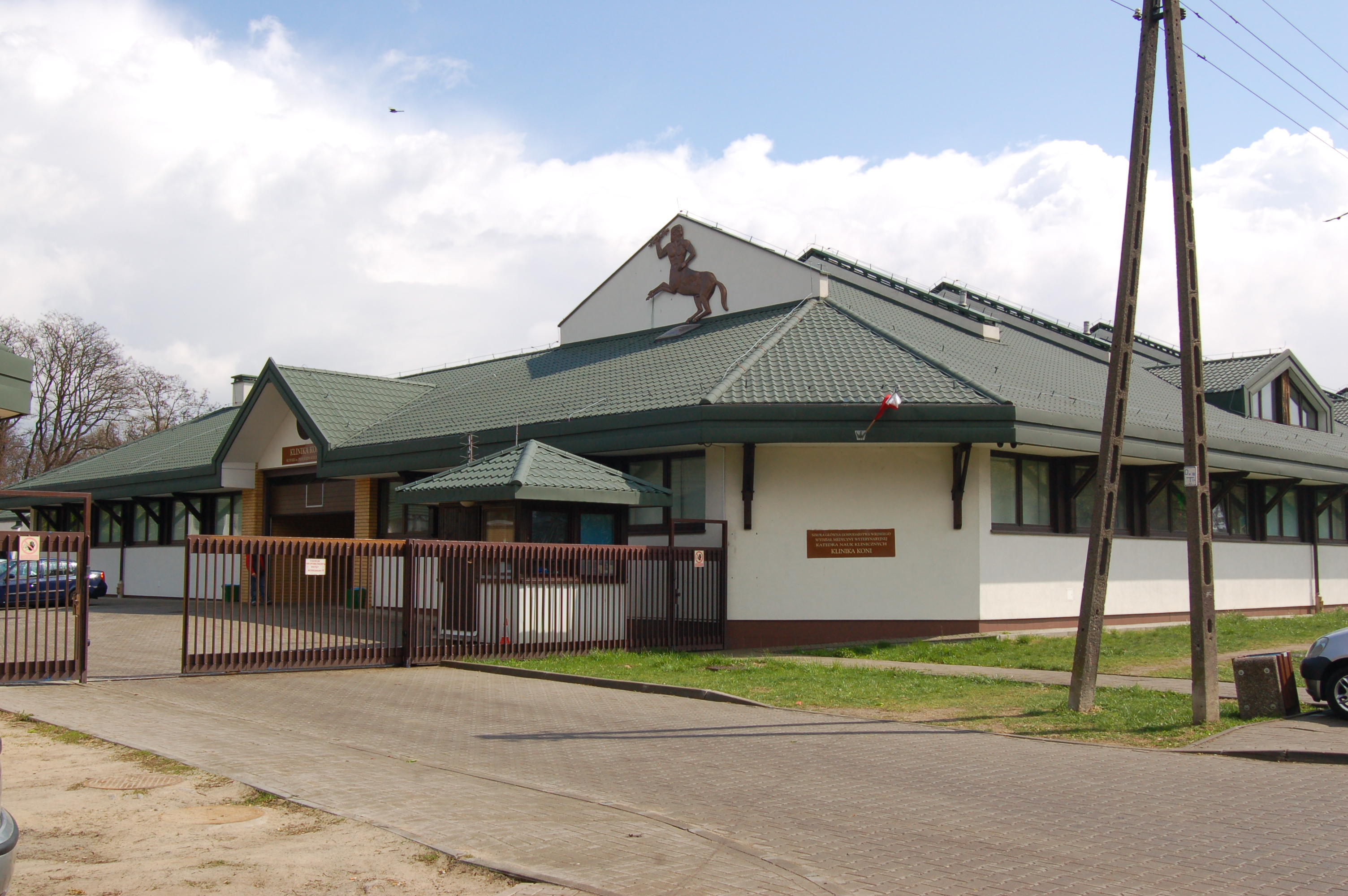 SGGW, Universität, Warschau, Pferdeklinik